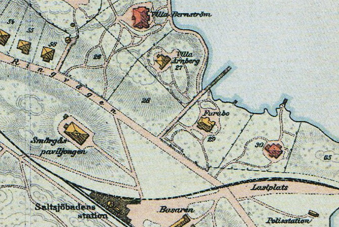 Tomtkarta över Villa Bernströ, Arnberg, Furubo, 1896